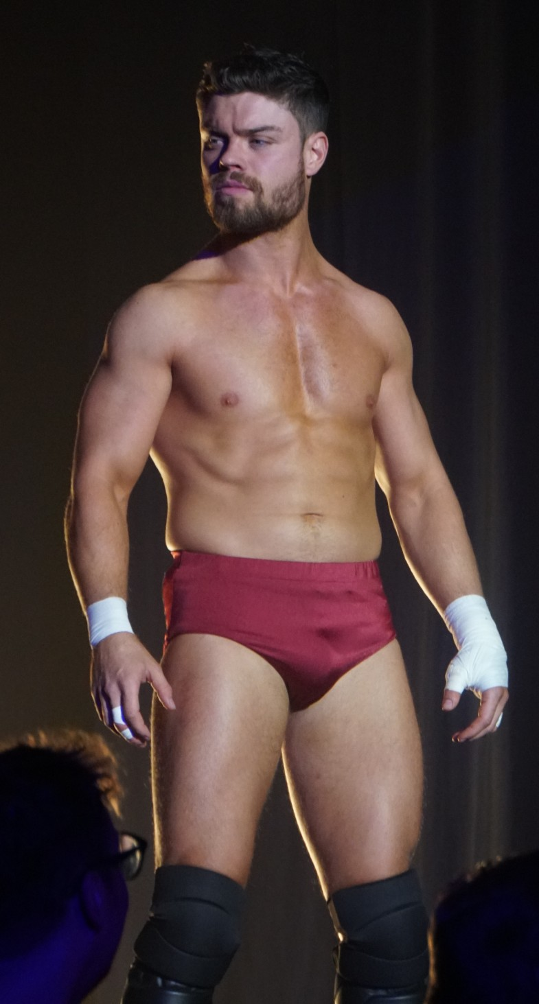 Flemish Wrestling Force - Wrestlefest 3 - Timm Wylie Vs Jordan Devlin Timm Wylie def. (Pin) Jordan Devlin ( Description: Pro Wrestling keert terug naar de Werft. Op zaterdag 20 januari keert Flemish Wrestling Force terug naar de Werft met een spetterende show vol actie en spektakel. Mannen en vrouwen van over heel Europa reizen af naar Geel om het beste worstelen, dat ooit in Belgie gezien is, te tonen. De blikvangers van Wrestlefest 3 zijn ongetwijfeld Doug Williams (UK) en Jordan Devlin (IR) . De Britse spierbundel Doug Williams behoort tot de absolute wereldtop. Hij is een voormalige TNA en ROH ster. Binnen TNA is hij een voormalig TNA X-Division Champion en TNA Tag Team Champion. Binnnen ROH droeg hij de ROH Pure Wrestling kampioenenriem. Jordan Devlin is een WWE ster uit Ierland die al op zijn twaalfde voor het eerst de ring in stapte. Hij werd opgeleid en wordt ondersteund door Finn Balor. Net zoals vele Ierse wrestlers hanteert hij een directe en fysiek intense wijze van worstelen. Ook de Fransman Lucas Di Leo was reeds actief binnen WWE NXT. Verder ontbreken de huidige FWF World Champion Phil Boyd (IR), FWF Queen of Extreme Katey Harvey (IR), FWF Tag Team Champions The Heroes Of Tomorrow en FWF Flemish Champion Gridlock niet. Tel daarbij nog de aanwezigheid van lokale helden en publiekslievelingen Rob Raw, Homeless Tom en Jungle Jill en je weet dat deze derde editie van Wrestlefest er eentje wordt om duimen en vingers bij af te likken! )